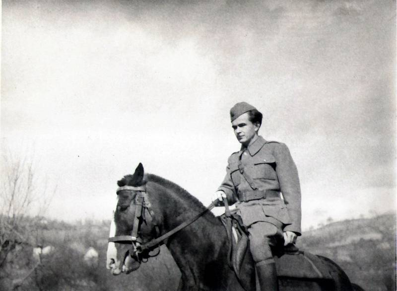 Srpskohrvatski / српскохрватски: Ivo Lola Ribar na svom konju Lisku, u vreme zasedanja AVNOJ-a u Jajcu 1943.